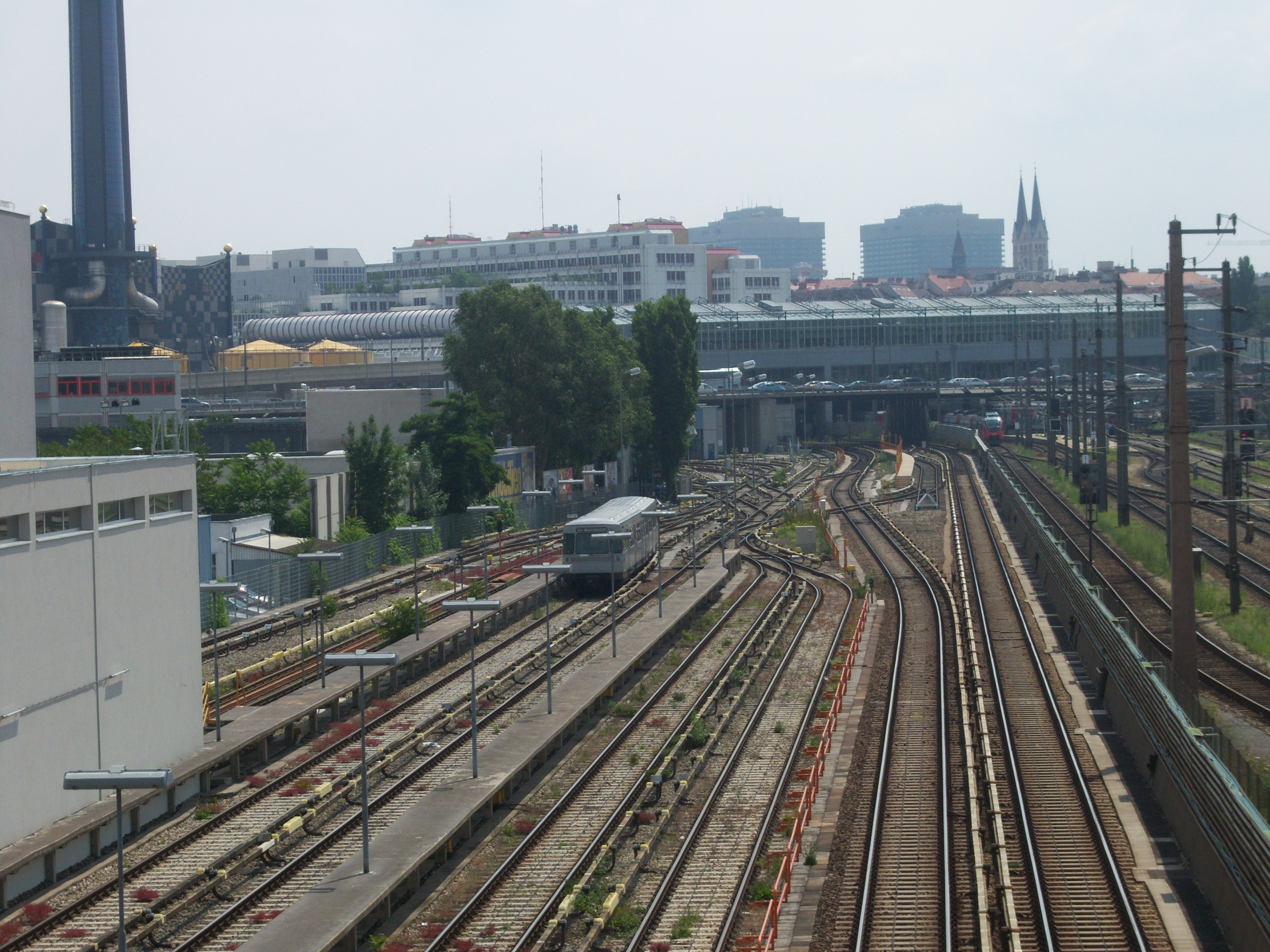 Betriebsbahnhof Wasserleitungswiese